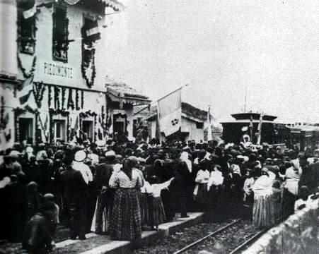 Immagine di inizio del XX secolo. Accoglienza dei Reali di Savoia alla stazione di Piedimonte Etneo (Catania), del viaggio effettuato sulla Ferrovia Circumetnea.